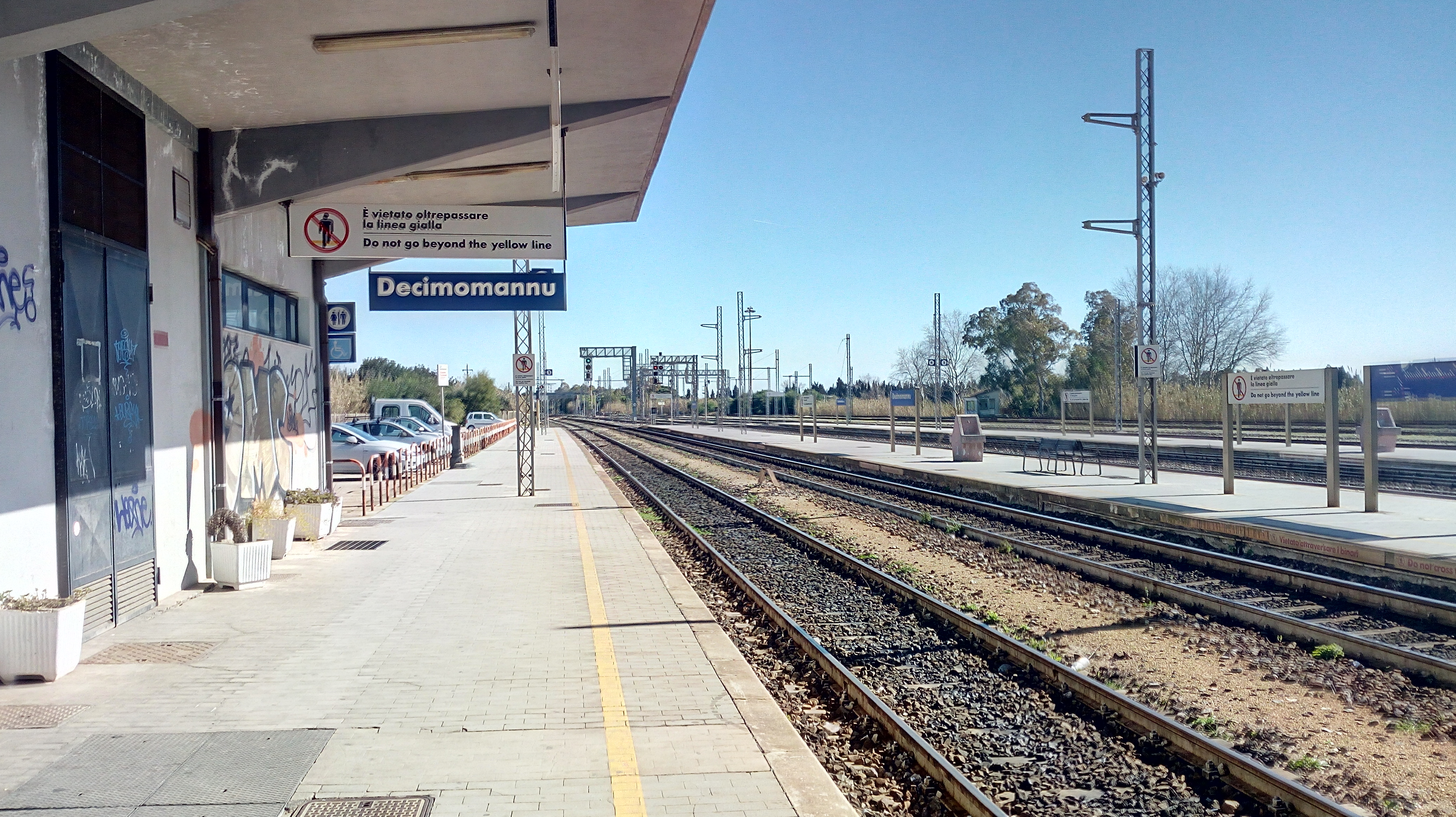 Vista verso Sud della stazione di Decimomannu, sono visibili il binario 1 e il fabbricato viaggiatori.